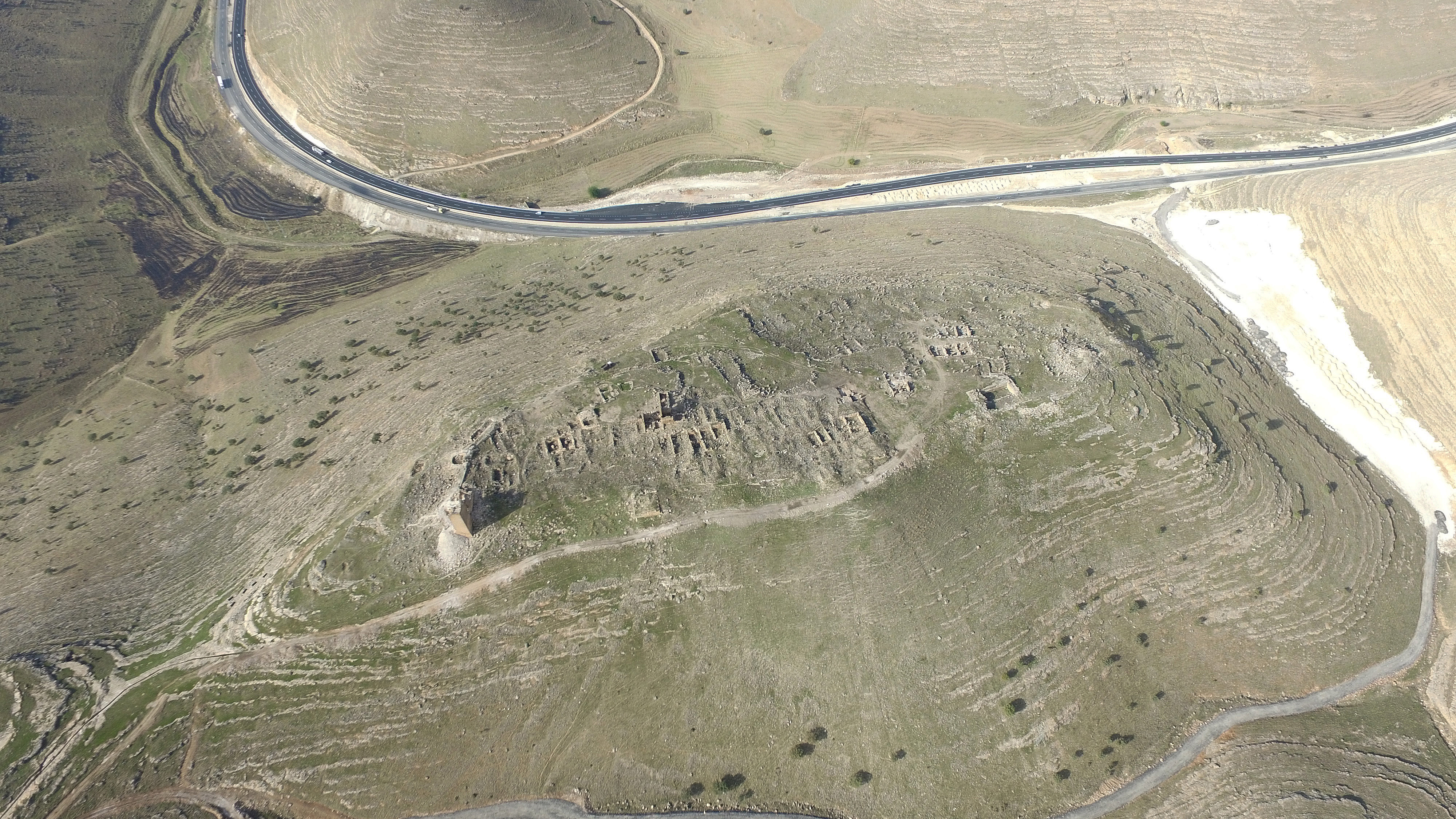 Zerzevan Kalesi hava fotoğrafı